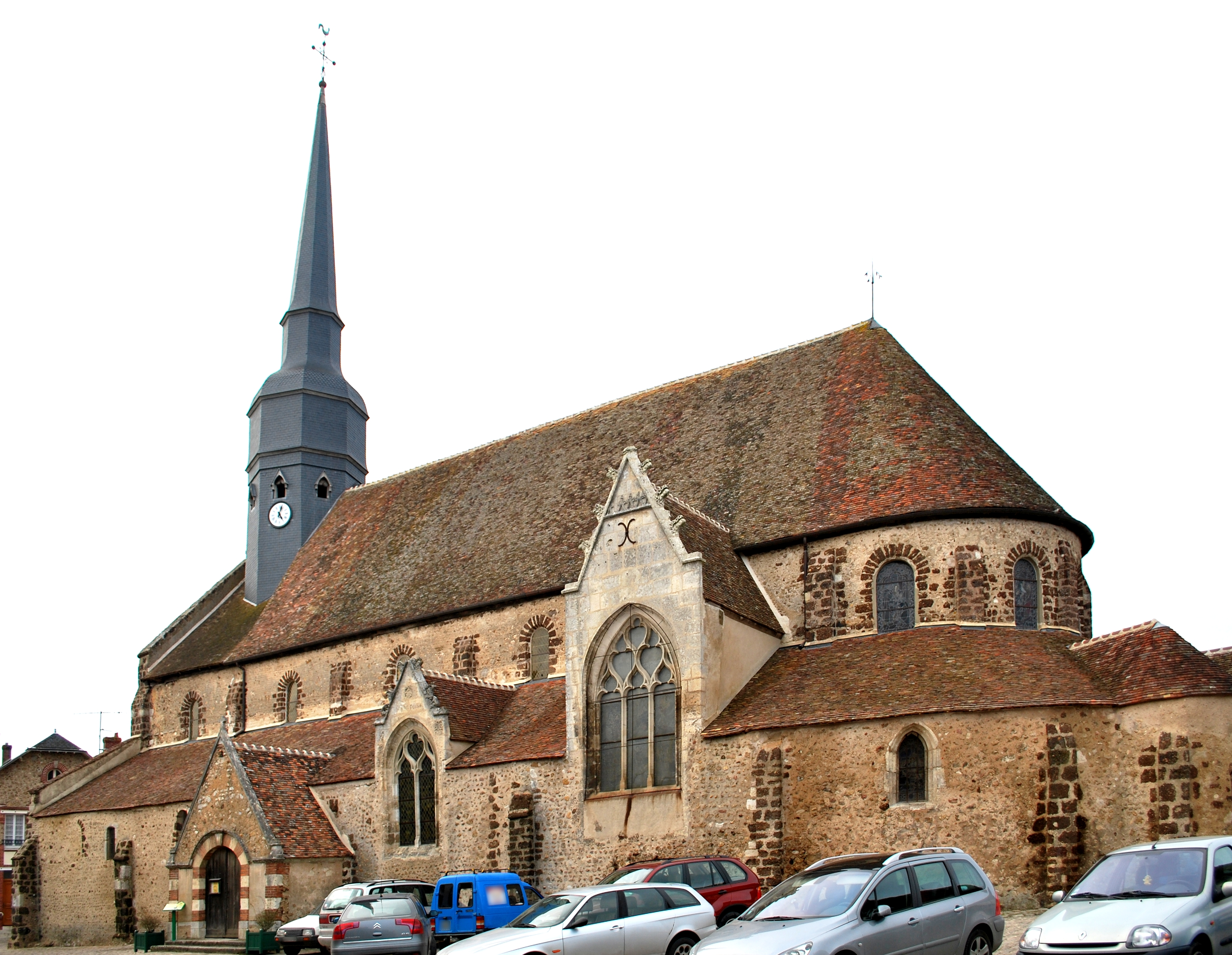 Église Saint-Georges de Dangeau (Classé) .